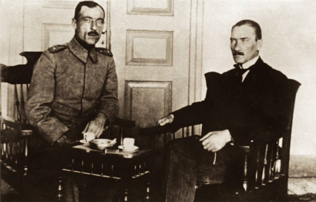 Mustafa Kemal (ATATÜRK) 5’inci Kafkas Tümeni Komutanı Cemil Cahit (TOYDEMİR) ile, Sivas, Eylül 1919